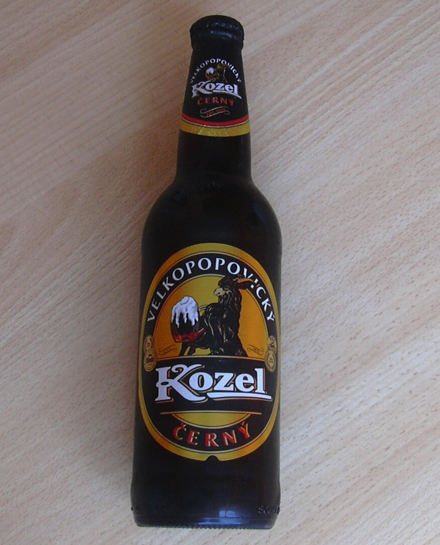 Velkopopovický kozel černý (Beer - Czech Republic)